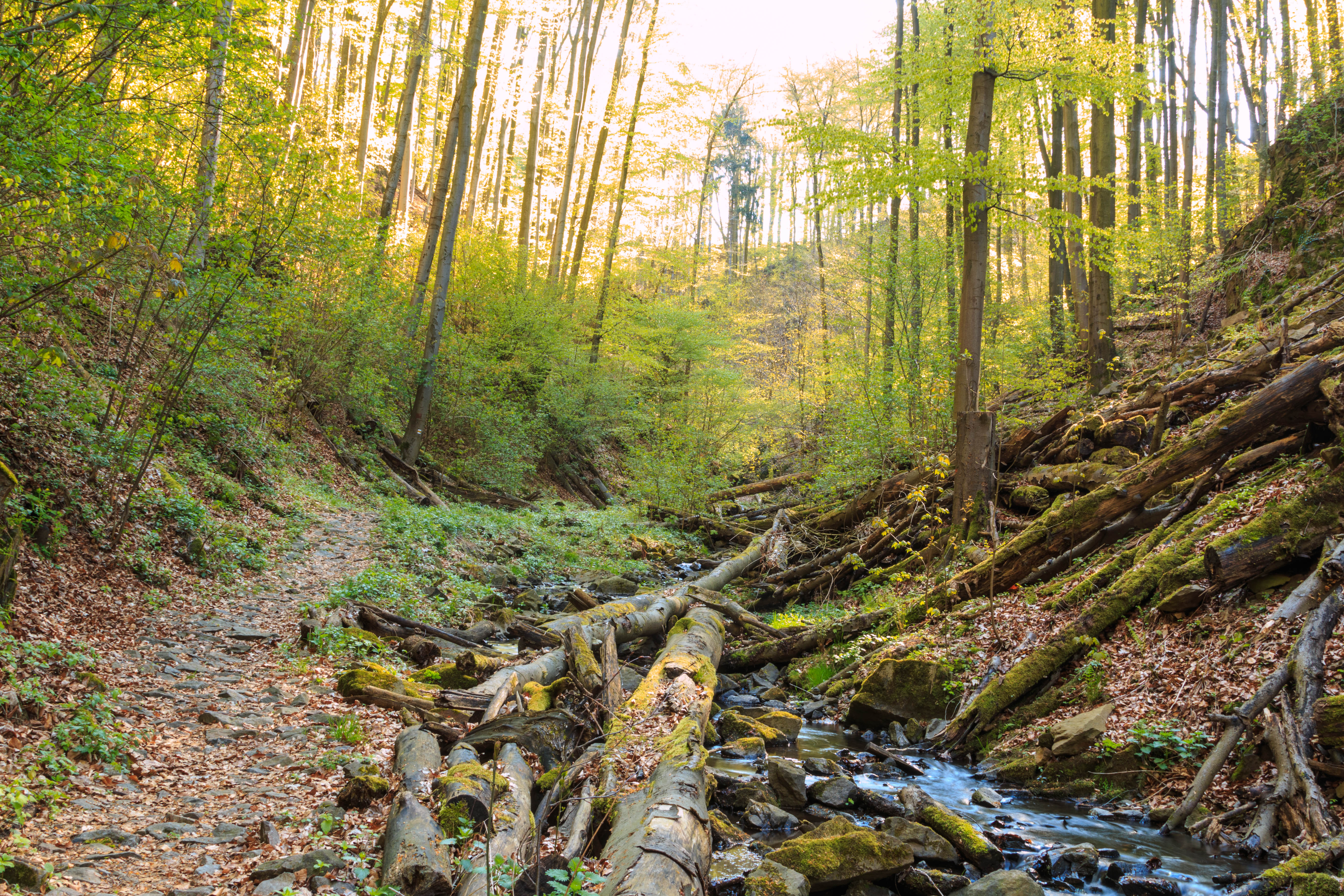 Lovětínská rokle Project: Chráněná území.